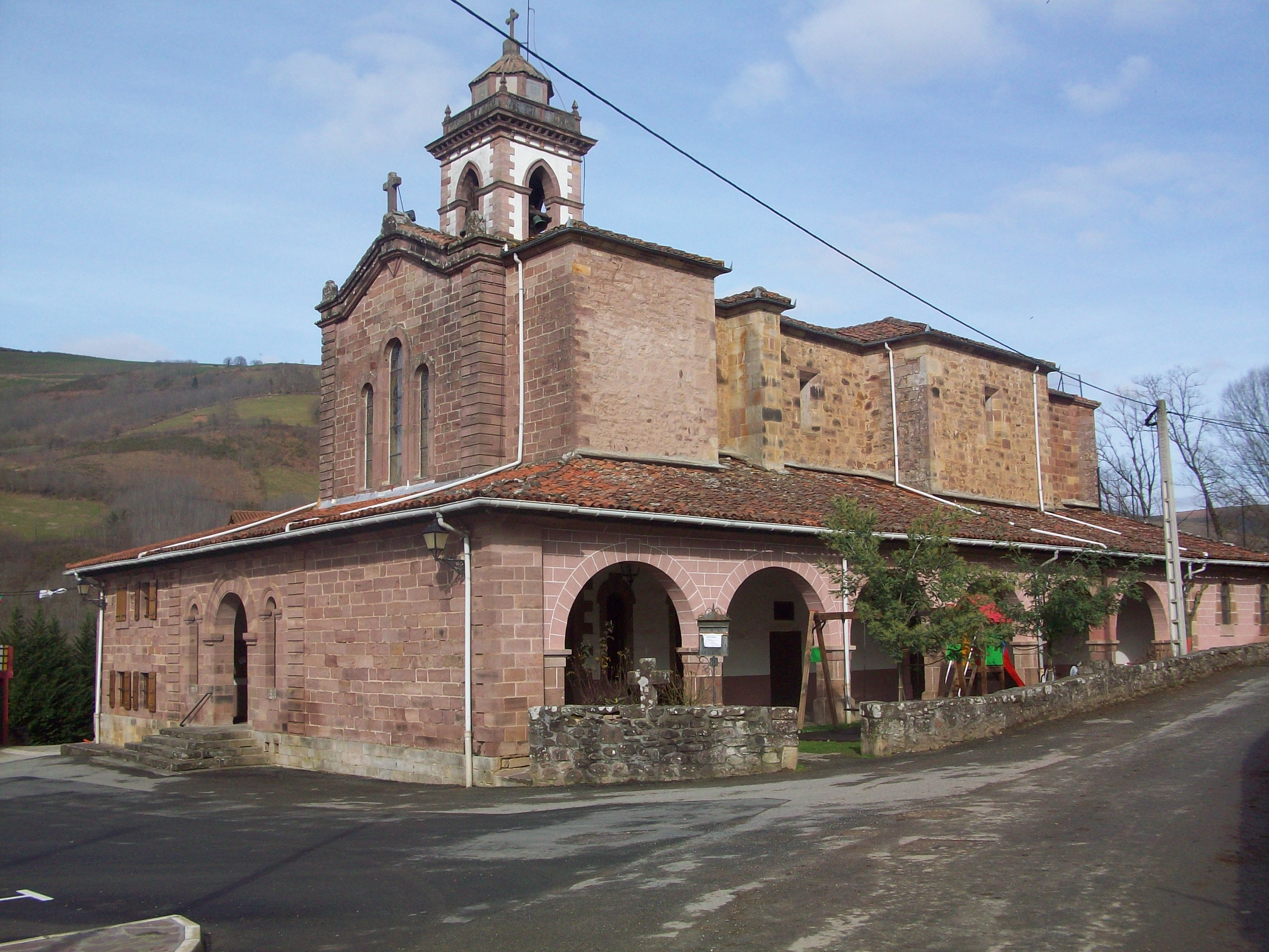 Baztango Arraioz udalerriko eliza. Nafarroa, Euskal Herria. Church of Arraioz, in Baztan. Navarre, Basque Country.